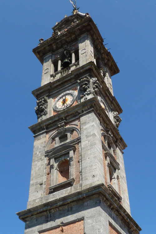 Il campanile della Basilica di San Vittore in Varese